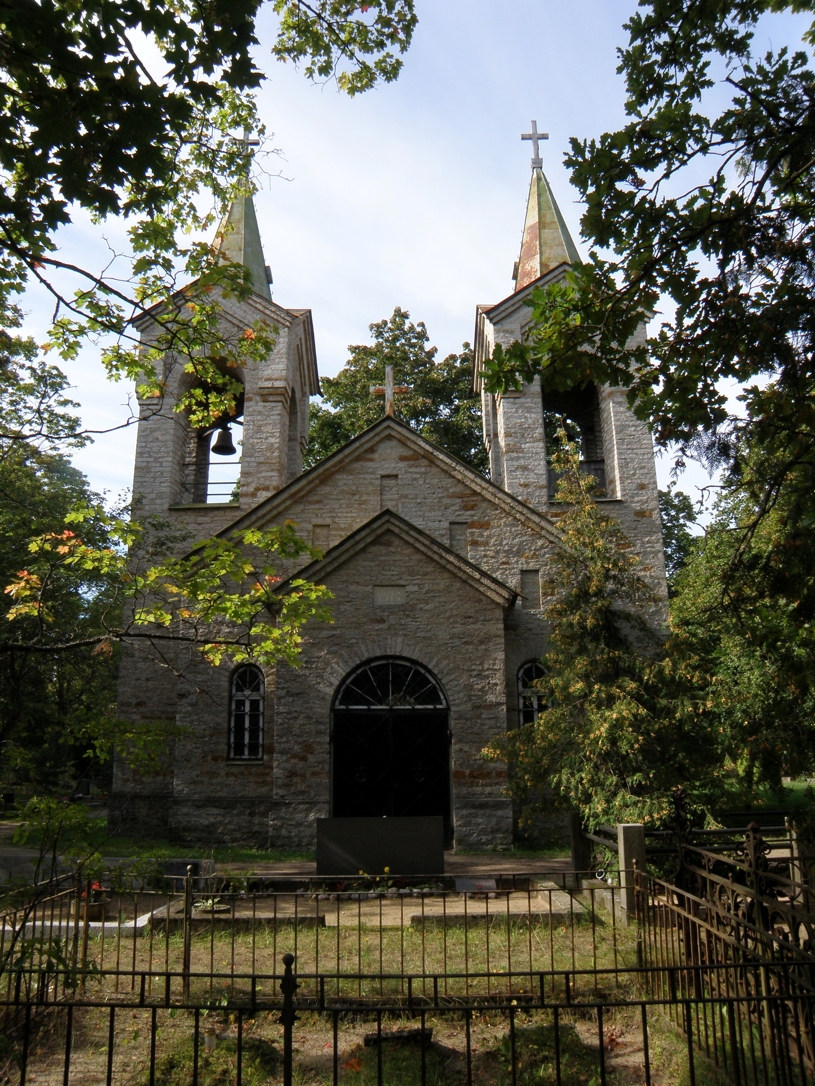 Rahumäe Kaarli kabel